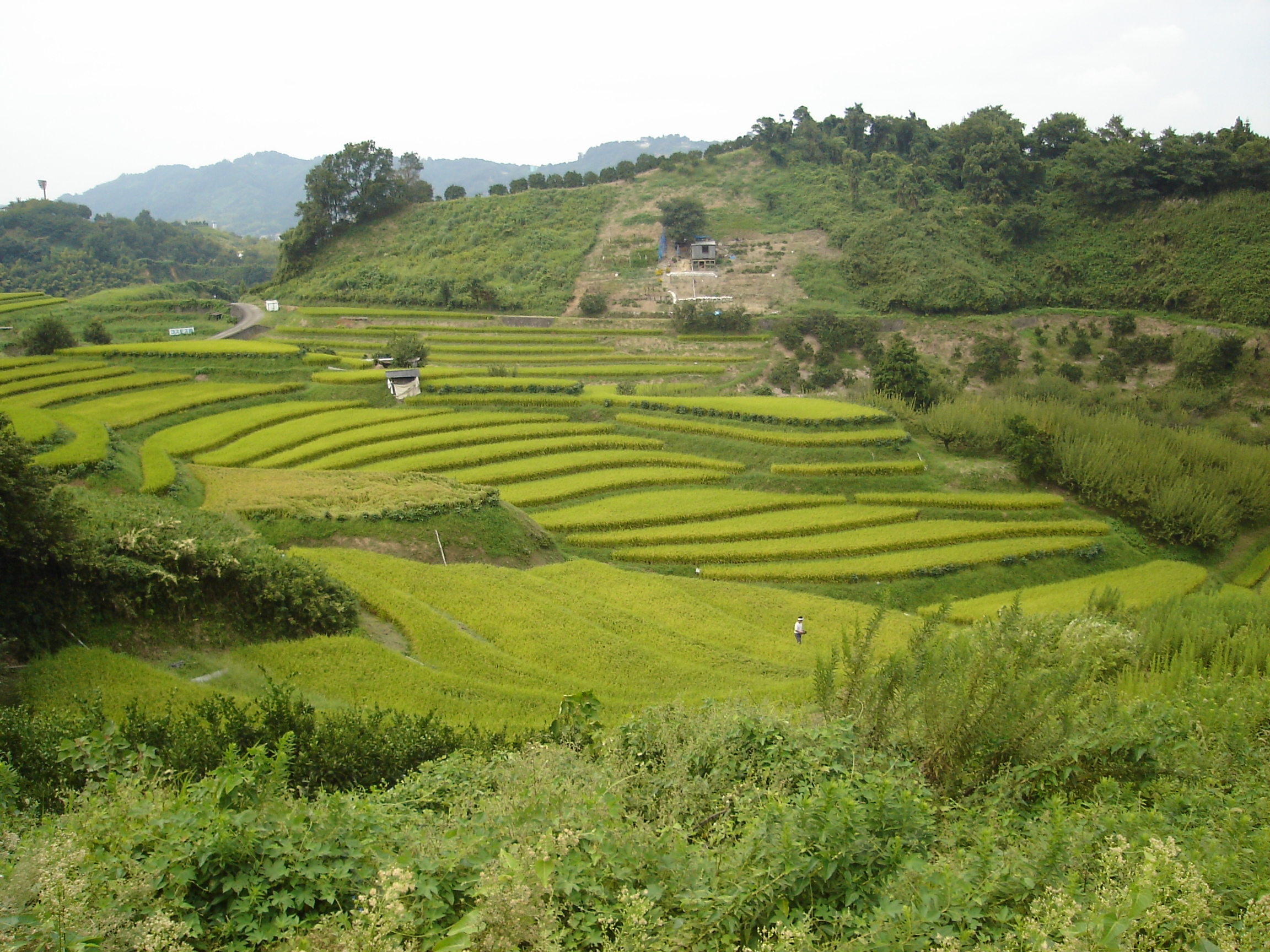 下赤坂城址に広がる棚田 2005年9月19日、大阪府千早赤阪村にて投稿者撮影